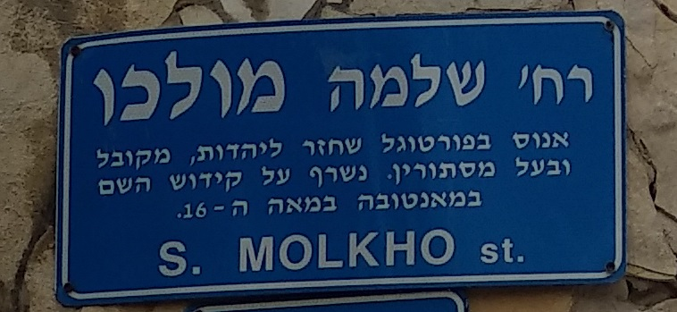 רחוב שלמה מולכו, נוה צדק, תל אביב